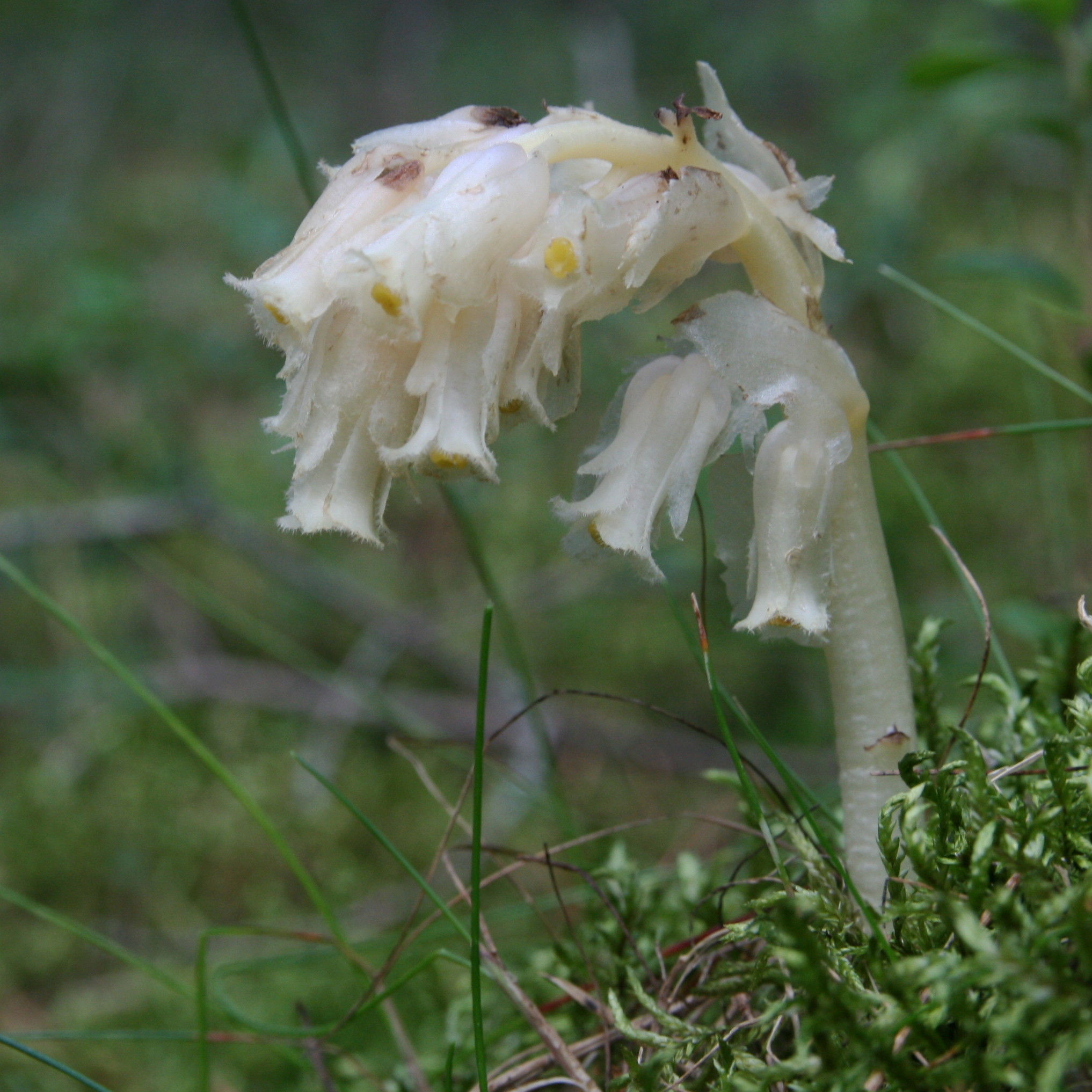 Mäntykukka, Monotropa hypopitys